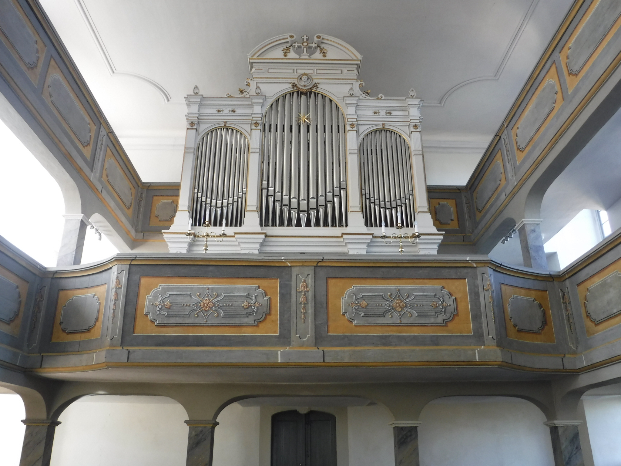 Die St. Bartholomäuskirche Klipphausen-Röhrsdorf